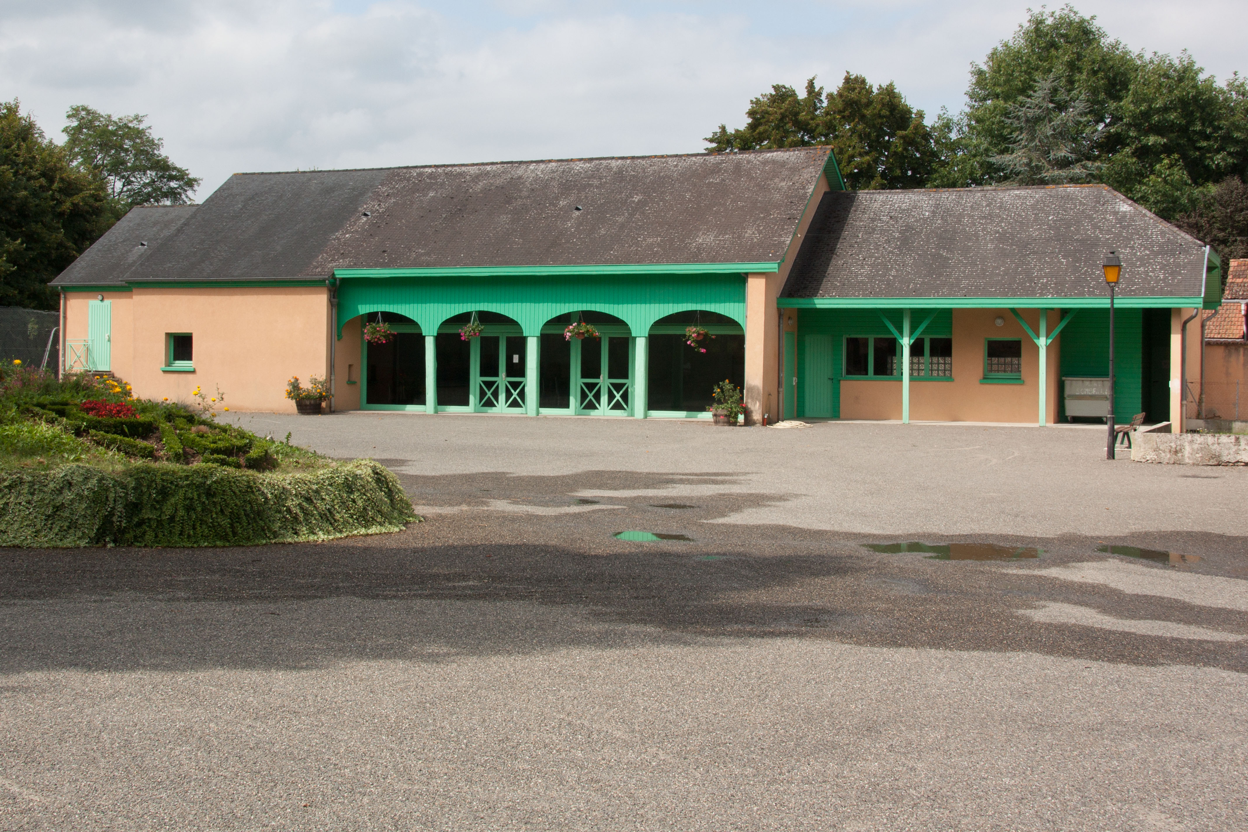 Foyer de Sombrun, Sombrun, Hautes-Pyrénées, France